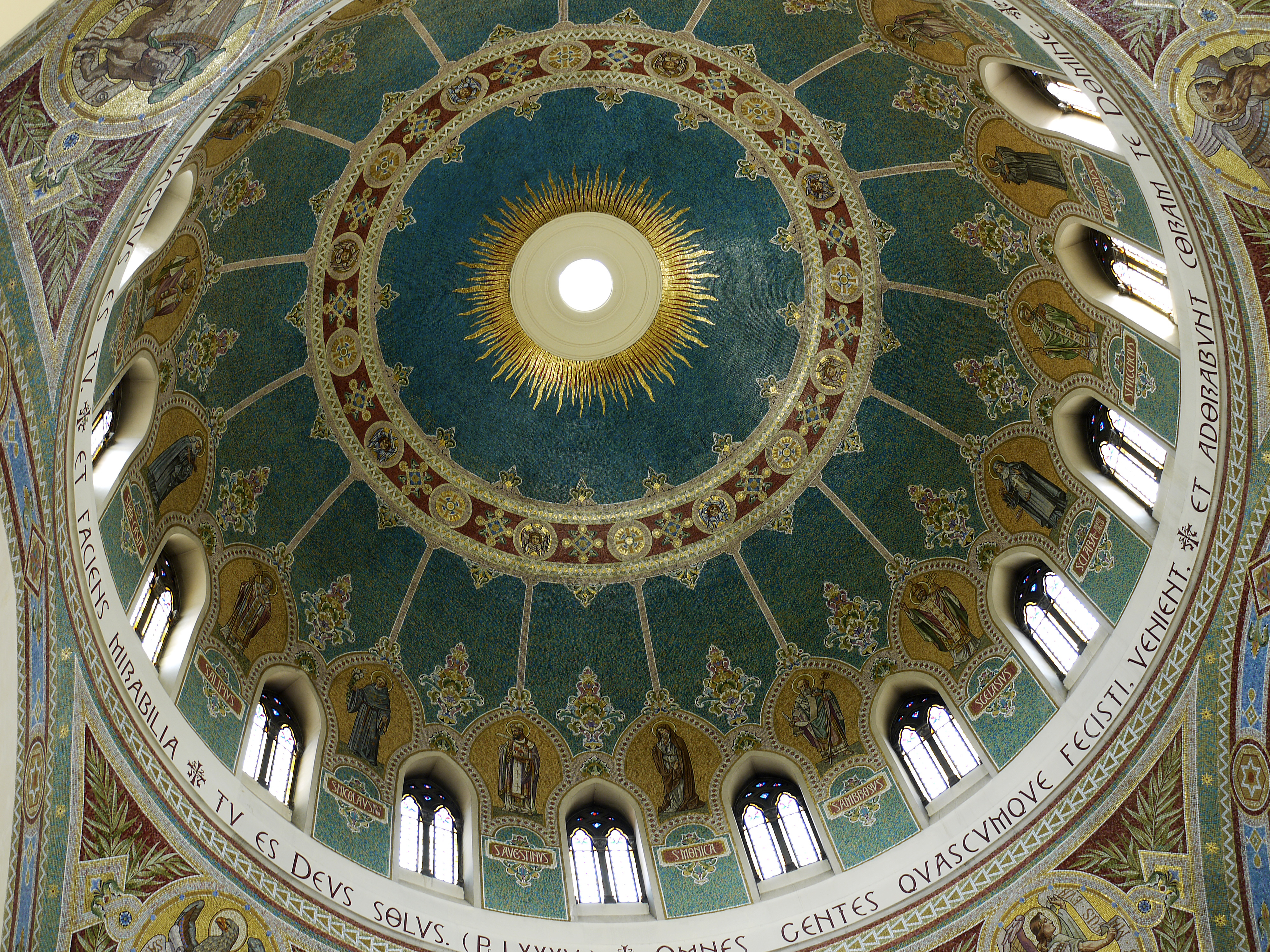 Iglesia Parroquial de San Manuel y San Benito. Orden de San Agustín. Madrid. España. Cupola interior.